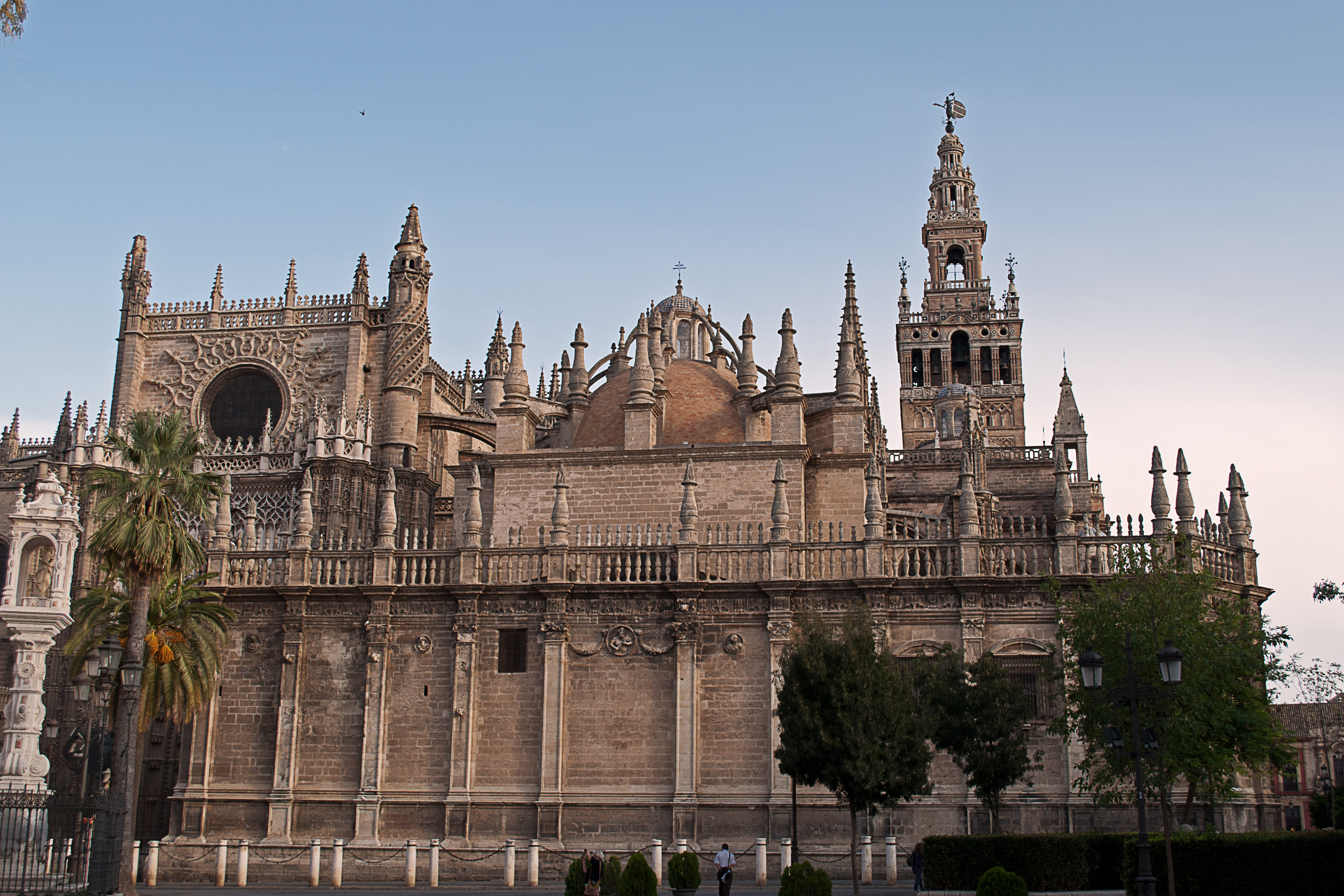 Vista exterior de la catedral de Sevilla